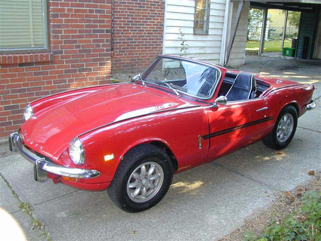 1969 Triumph Spitfire MK3